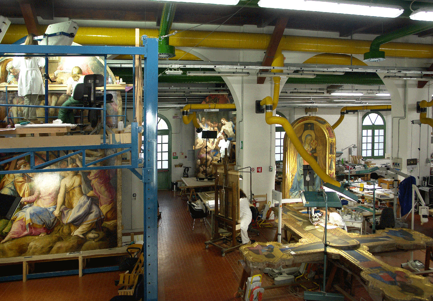 Il laboratorio di restauro della Fortezza, Opificio delle Pietre Dure; immagine di proprietà dell'Opificio delle Pietre Dure, distribuita liberamente alla stampa; anno 2006